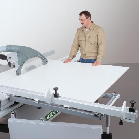 Anwender an der Formatkreissäge